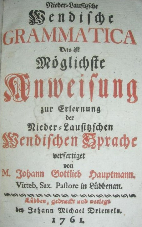 title page of: Johann Gottlieb Hauptmann: Nieder-Lausitzische Wendische Grammatica. Das ist Möglichste Anweisung zur Erlernung der Nieder-Lausitzschen Wendischen Sprache. Johann Michael Driemel, Lübben 1761